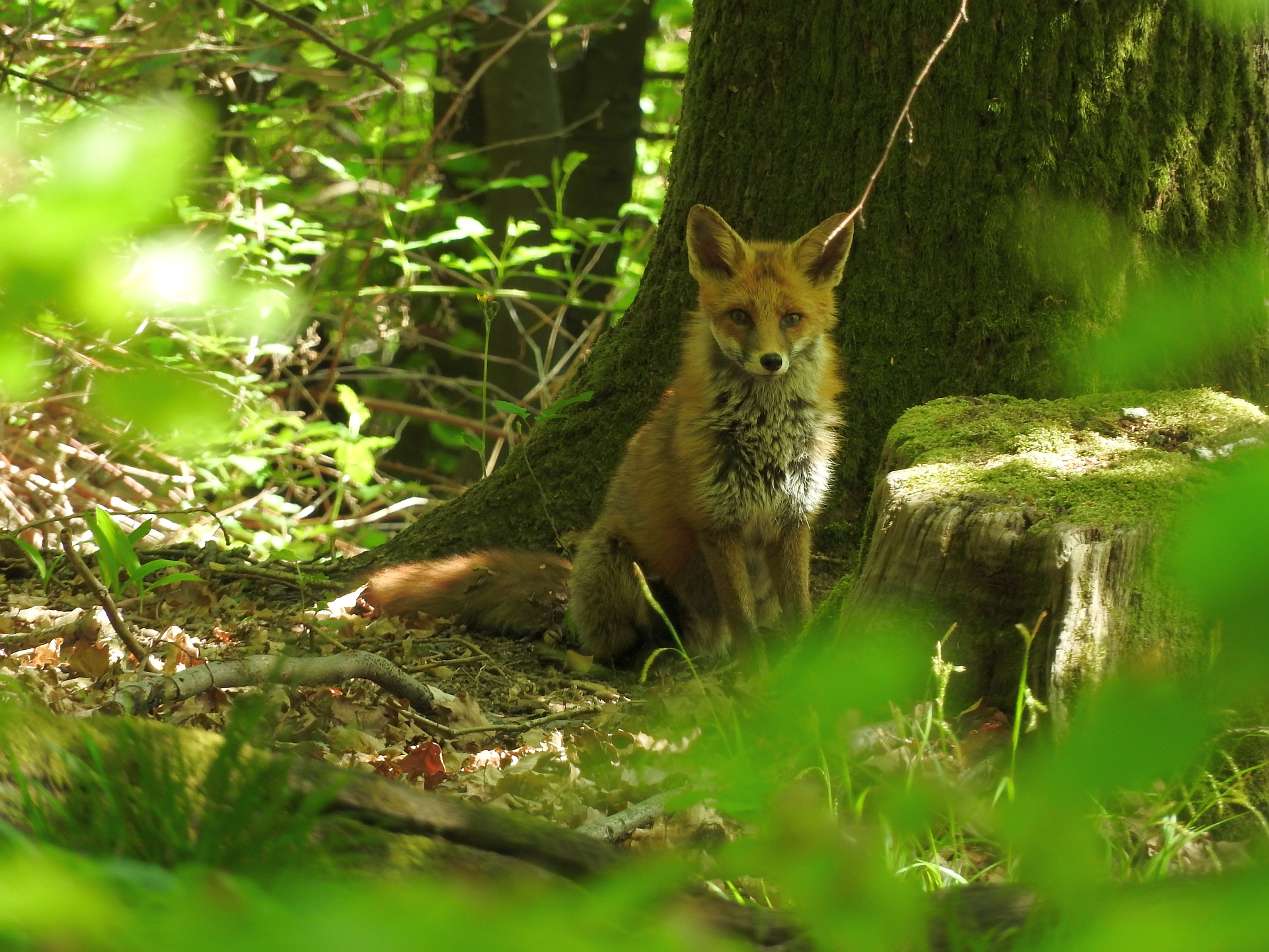 Rotfuchs, Ungeheuerklamm, 29.04.2017